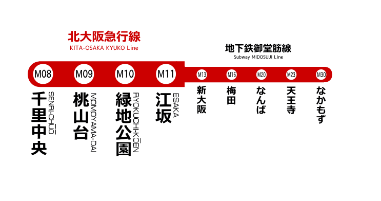 北大阪急行南北線路線図